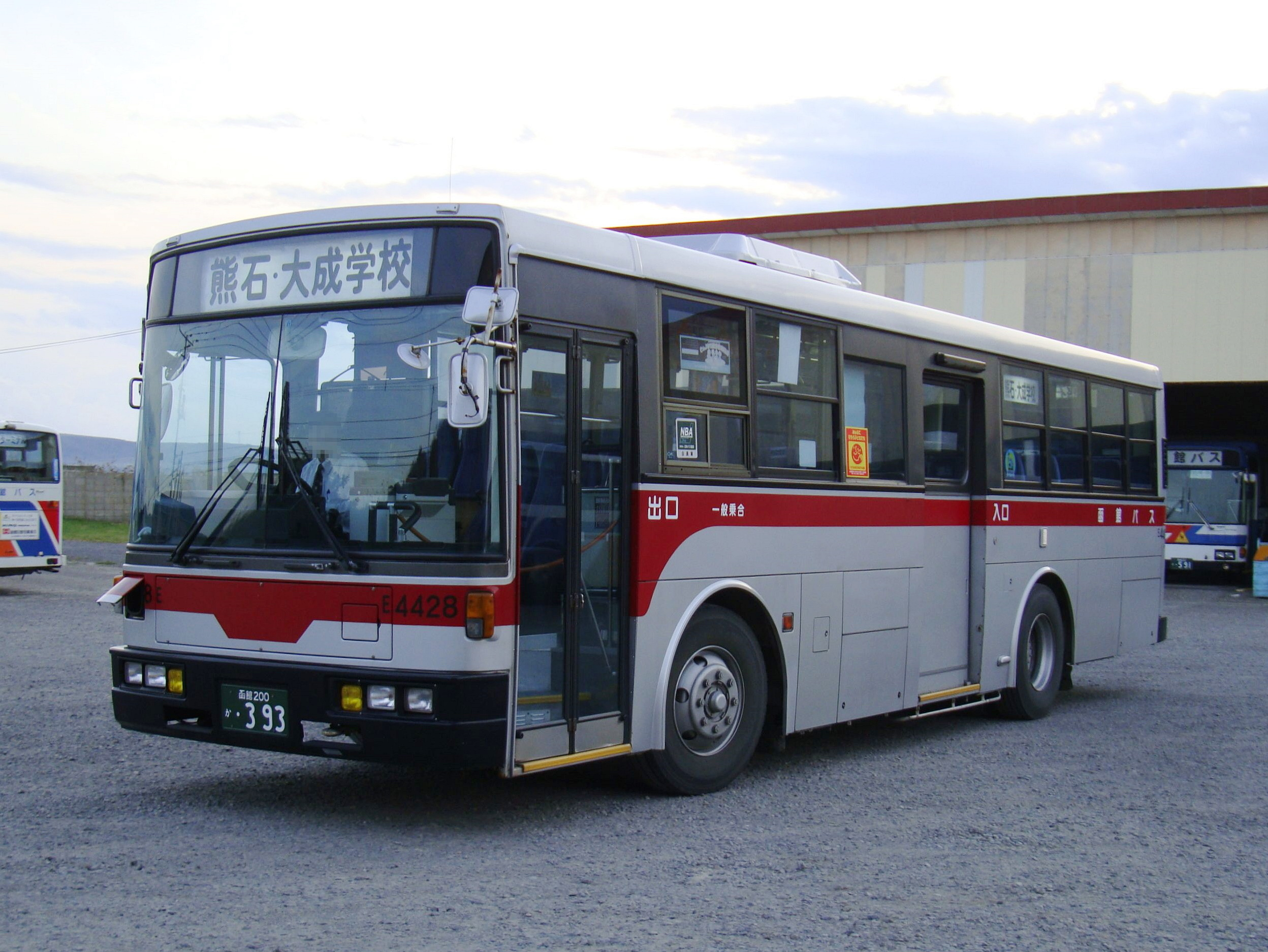 Esashi to Setana-Taisei